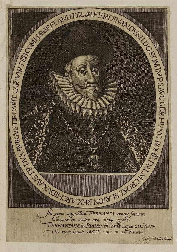 Grafik aus dem Klebeband Nr. 1 der Fürstlich Waldeckschen Hofbibliothek Arolsen Motiv: Kaiser Ferdinand II.